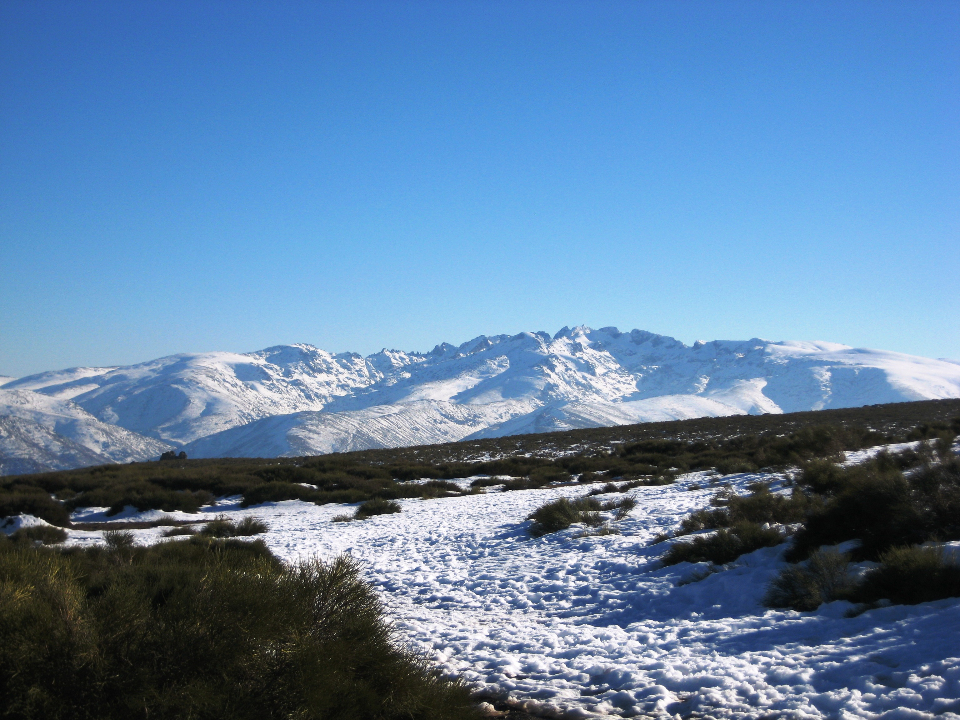 SIERRA DE GREDOS (AVILA, ESPAÑA). Tomada desde el Puerto de Peñanegra (Sierra de Villafranca).